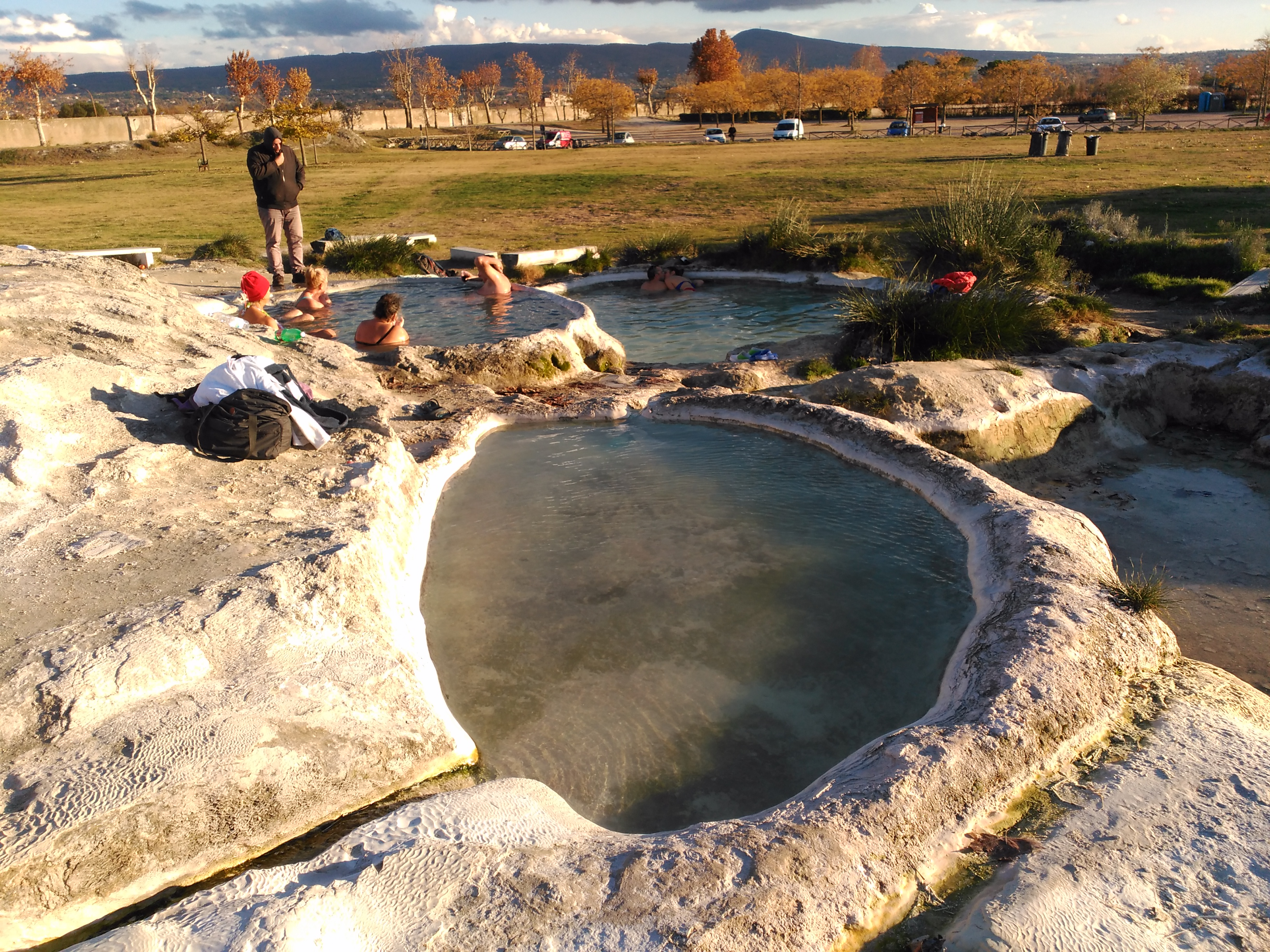 Piscina de "Piscine Carletti", Aguas termales volcánicas, ricas en sulfuro, libres. Viterbo